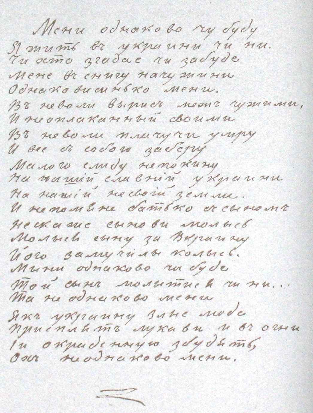 Фотокопия рукописи Т. Г Шевченко